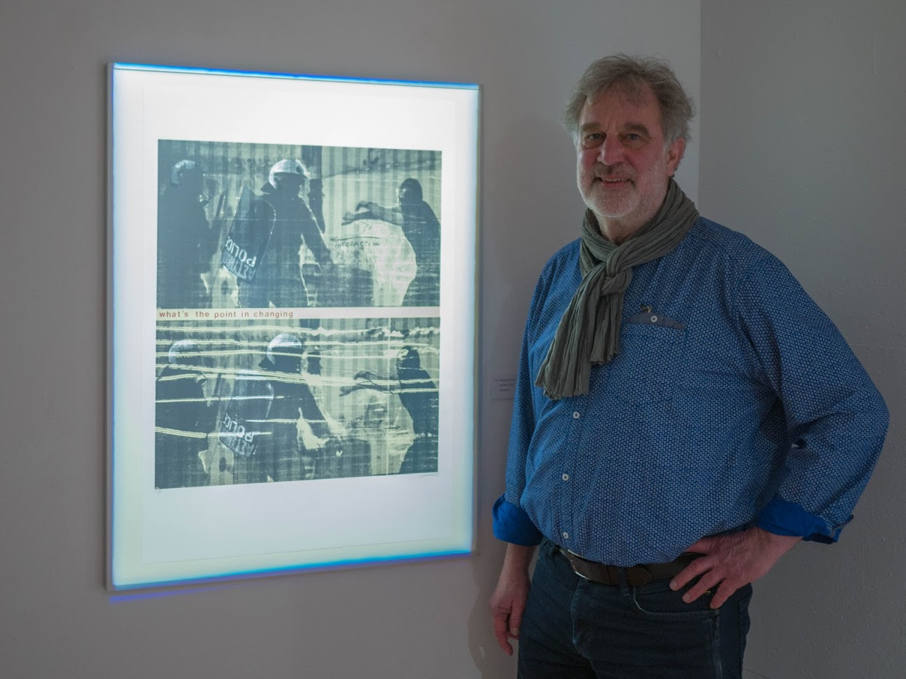 Wolfgang Brenner vor dem Werk "what's the point in changing" Ausstellung zu "50 Jahre Kunstverein Paderborn"